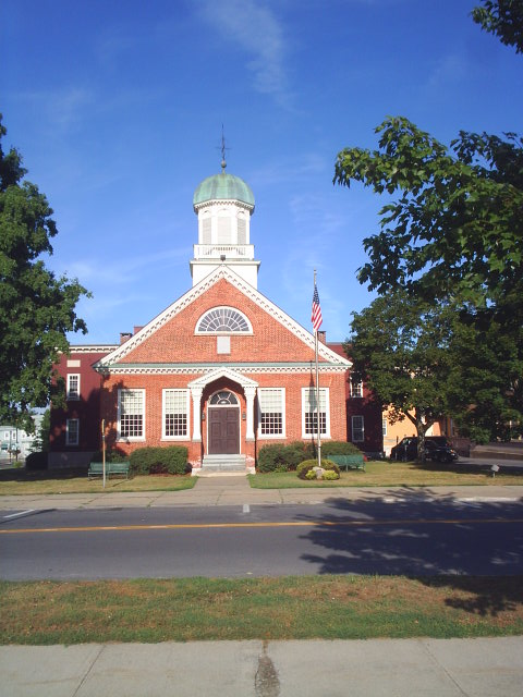 M3367S-4504